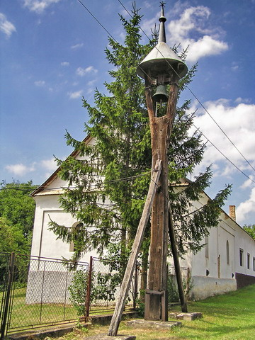 Mladzovo